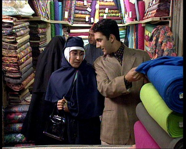 Naman Tarcha - Attore Fiction siriana "Khan al Harir"